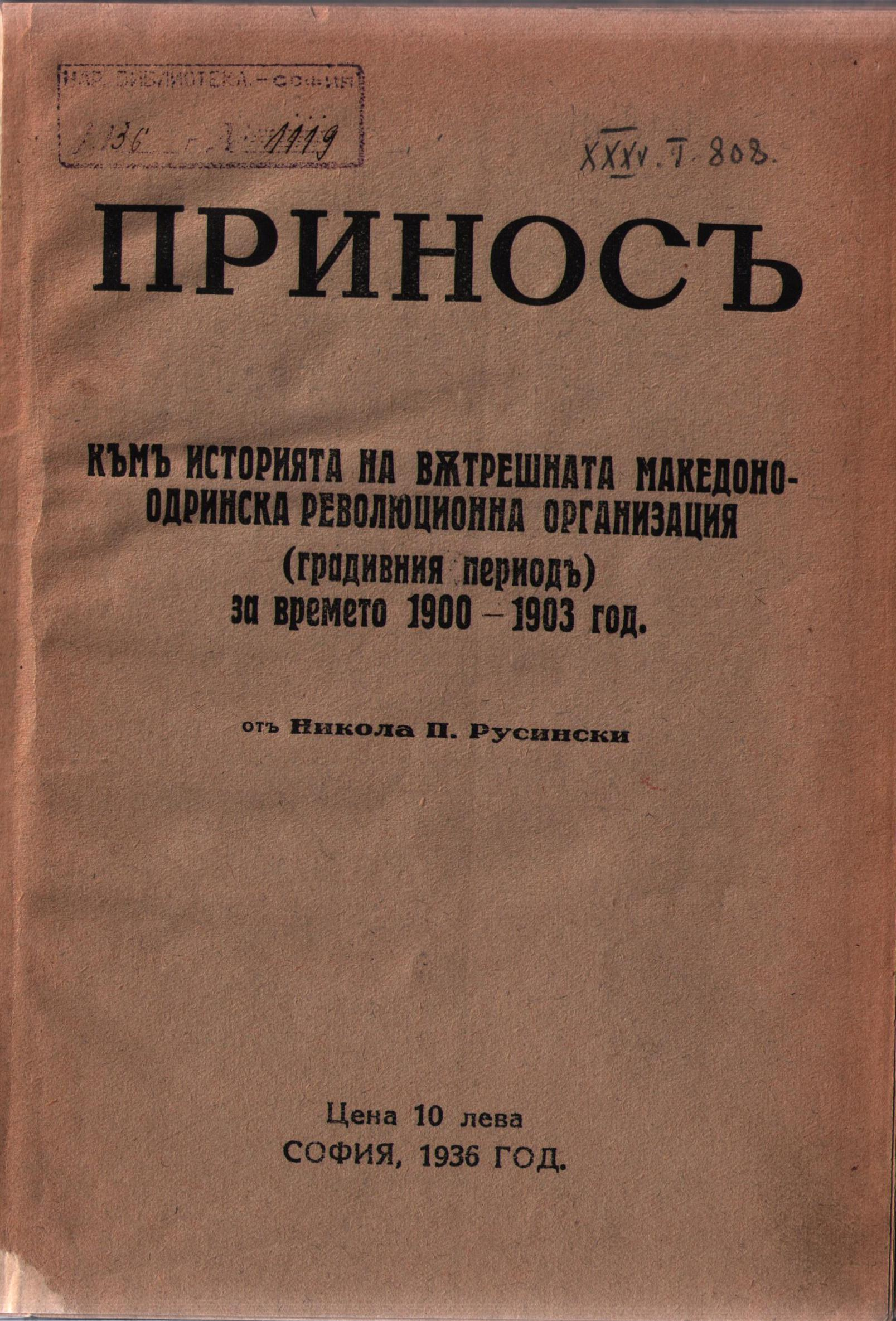 Корица на "Принос към историята на Вътрешната македоно-одринска революционна организация (градивния период) за времето 1900 - 1903 г."